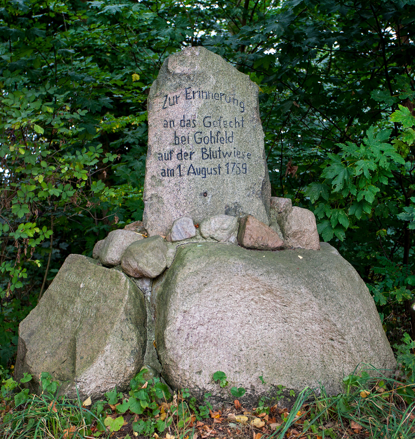 Gedenkstein „Zur Erinnerung an das Gefecht bei Gohfeld auf der Blutwiese am 1 August 1759“ This is a photograph of an architectural monument.